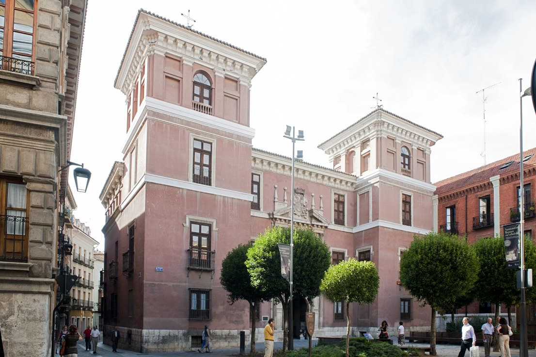 Fachada principal del Palacio de Fabio Nelli, sede del Museo de Valladolid